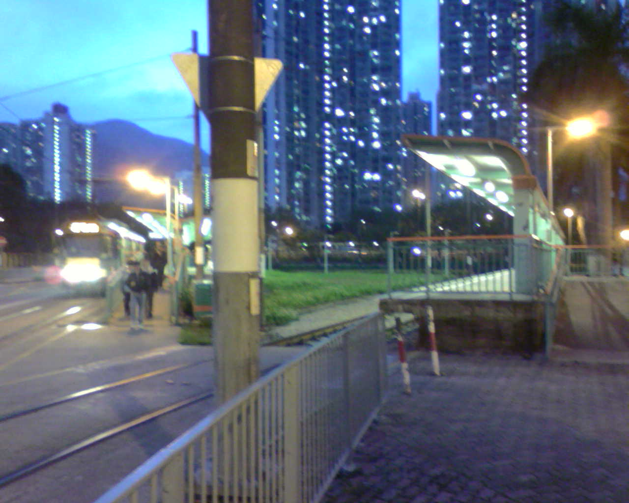 中文（香港）: 輕鐵大興北站3號月台，攝於大興北站2號月台出口。